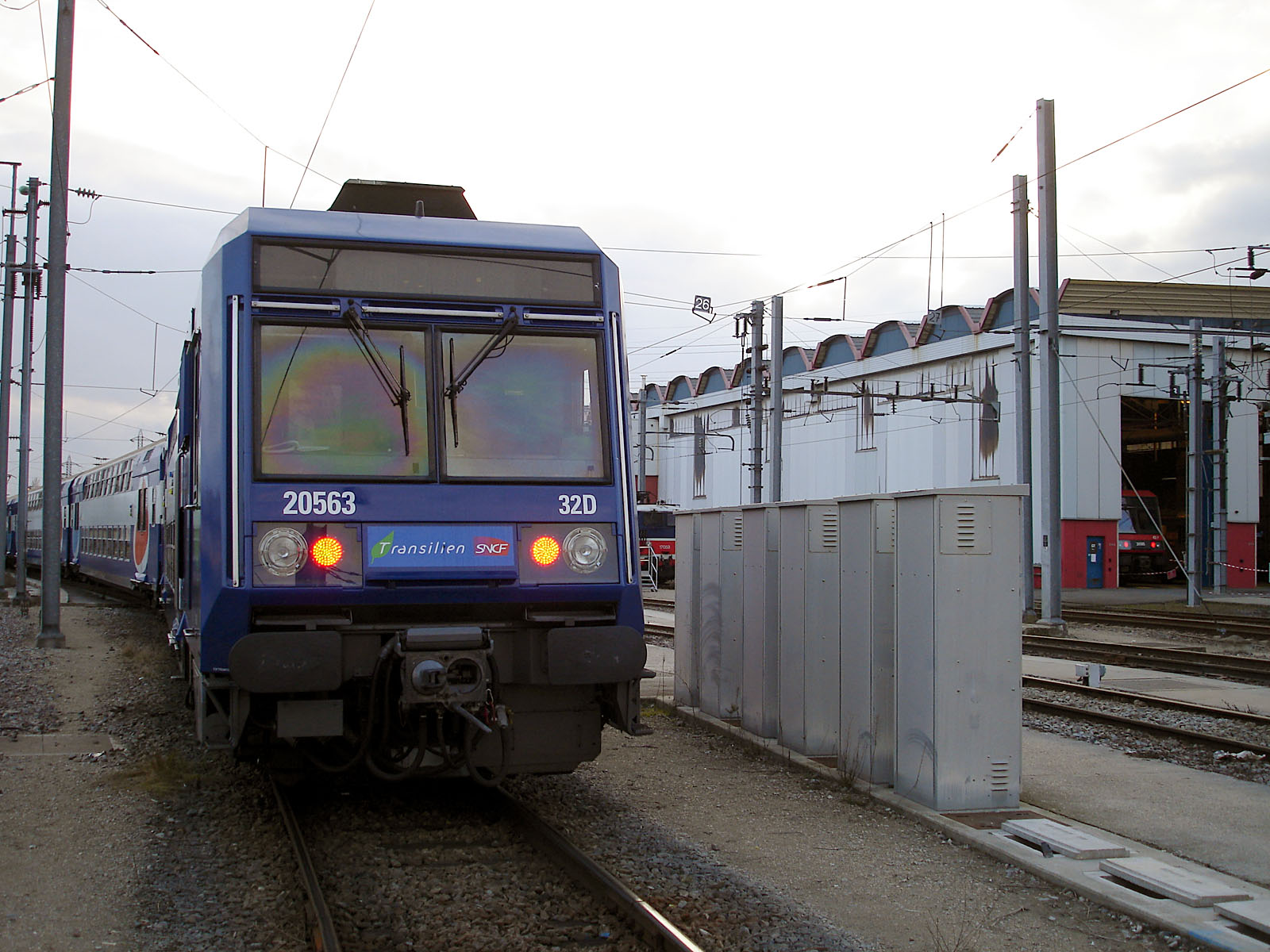 Z 20500 au technicentre Paris Nord-Joncherolles, Villetaneuse, Seine-Saint-Denis, France.